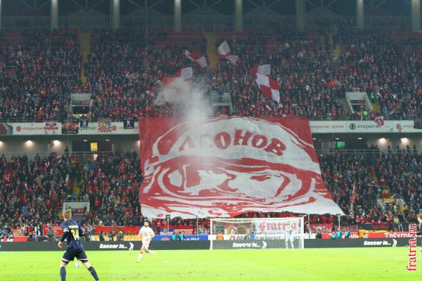 Перформанс, посвященный болельщику красно-белых космонавту Леонову в преддверии Дня космонавтики